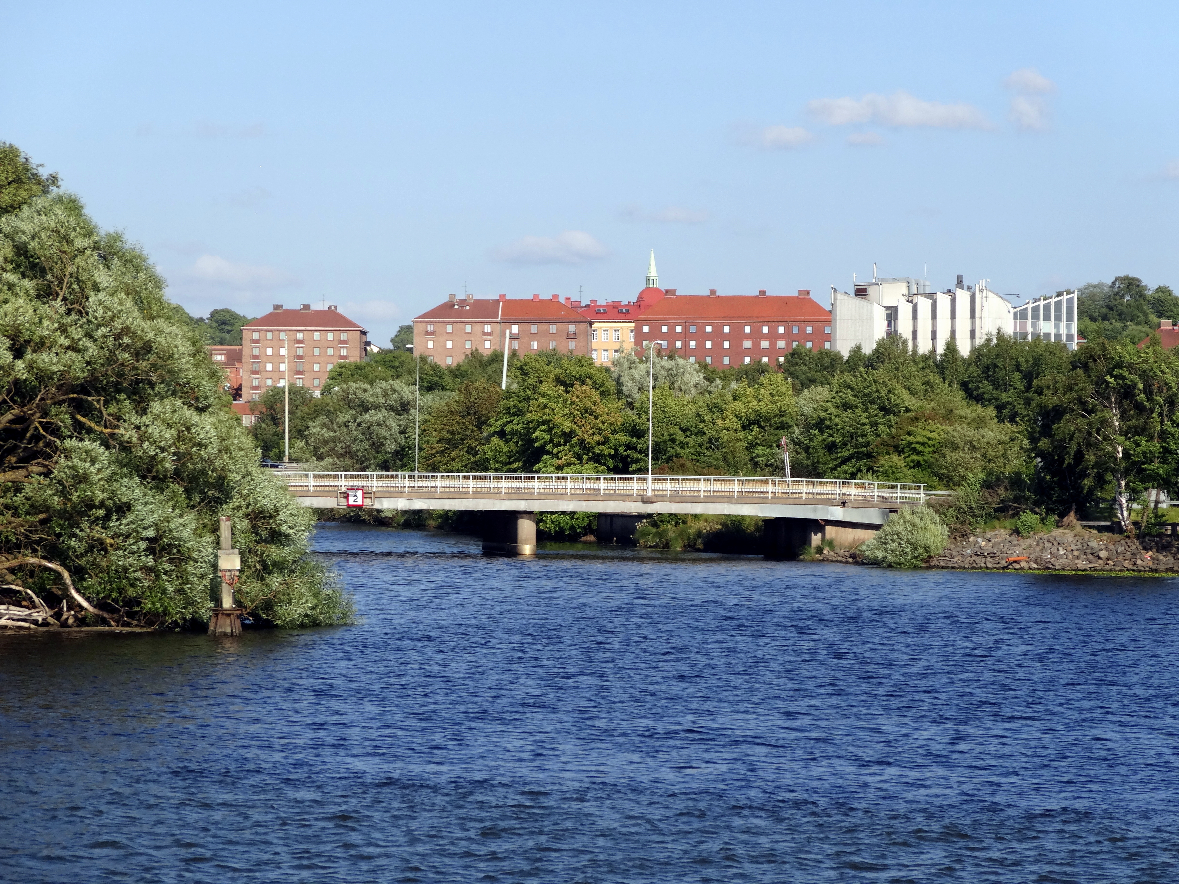 Gullbergs strandgata i stadsdelen Gullbergsvass i Göteborg, bro över Säveåns utlopp i Göta älv. Till höger syns överdelen av rivningshotade Westsamhuset i Olskroken.